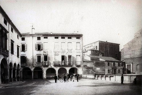 Piazza Duomo a Padova prima delle demolizioni.